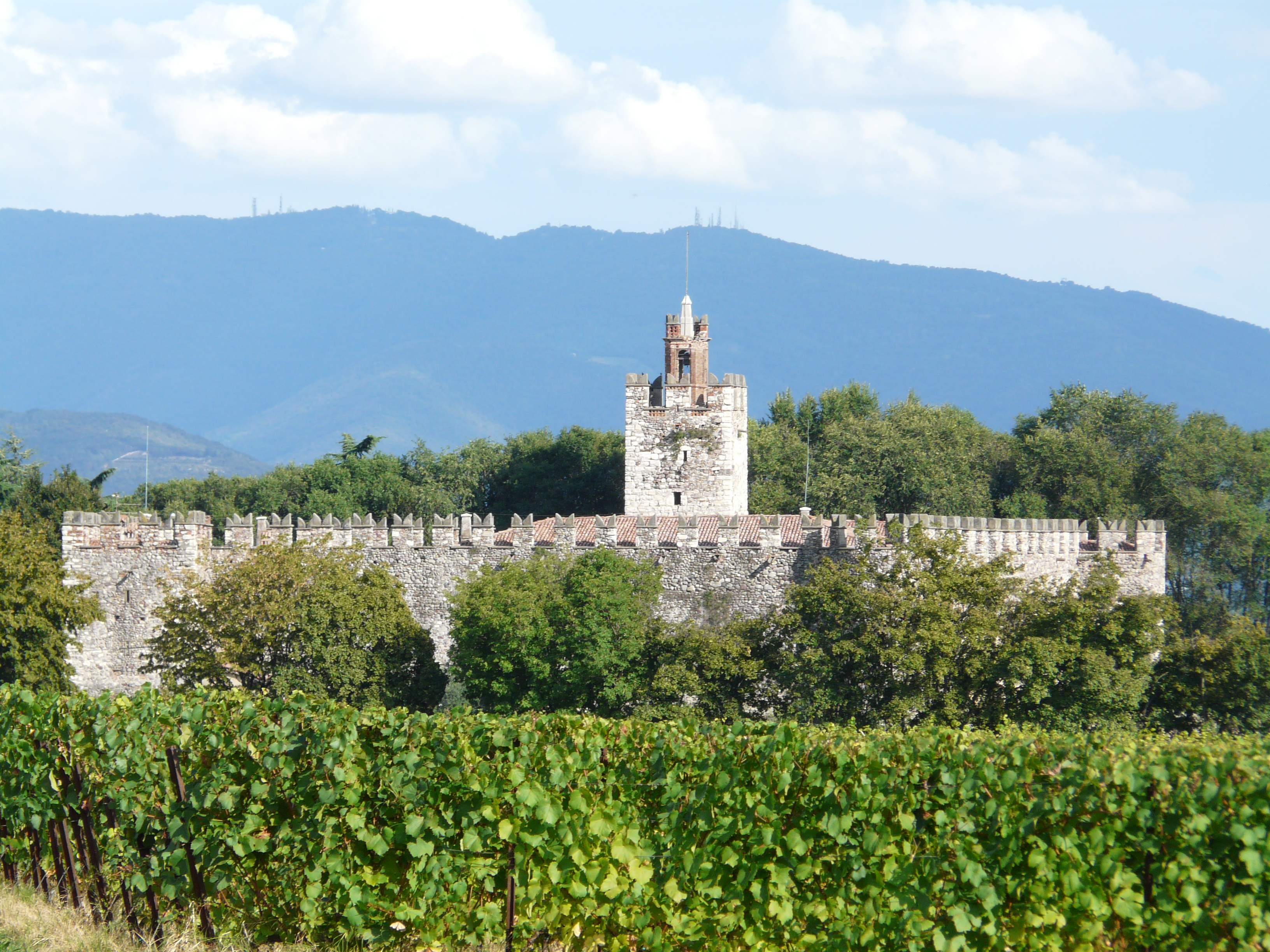 Veduta del Castello di Passirano